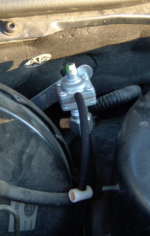 Kaltlaufregler der Firma Twin-Tec eingebaut in einem Ford Mondeo